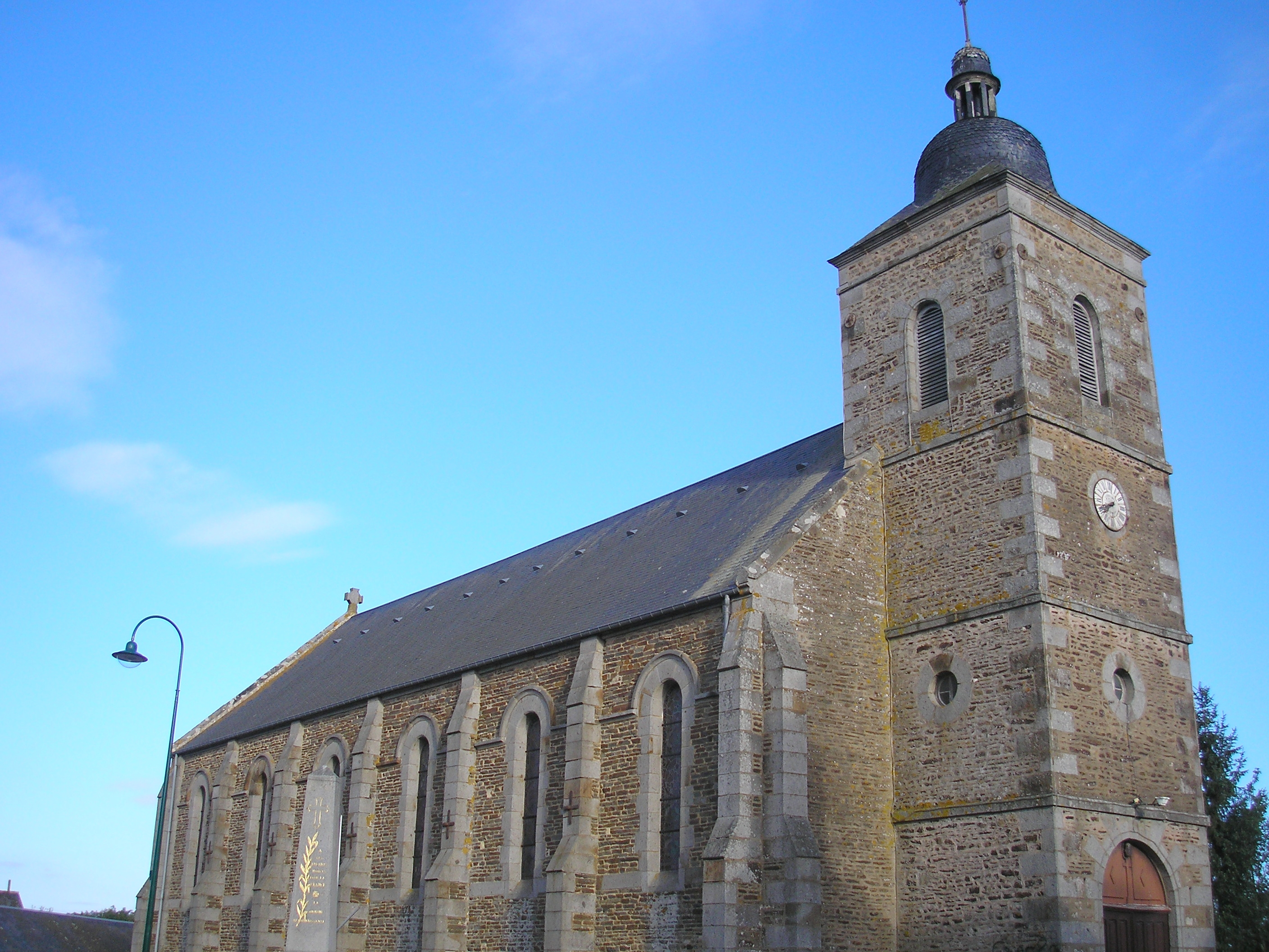 Ménil-Hubert-sur-Orne (Normandie, France). L'église Saint-Martin.